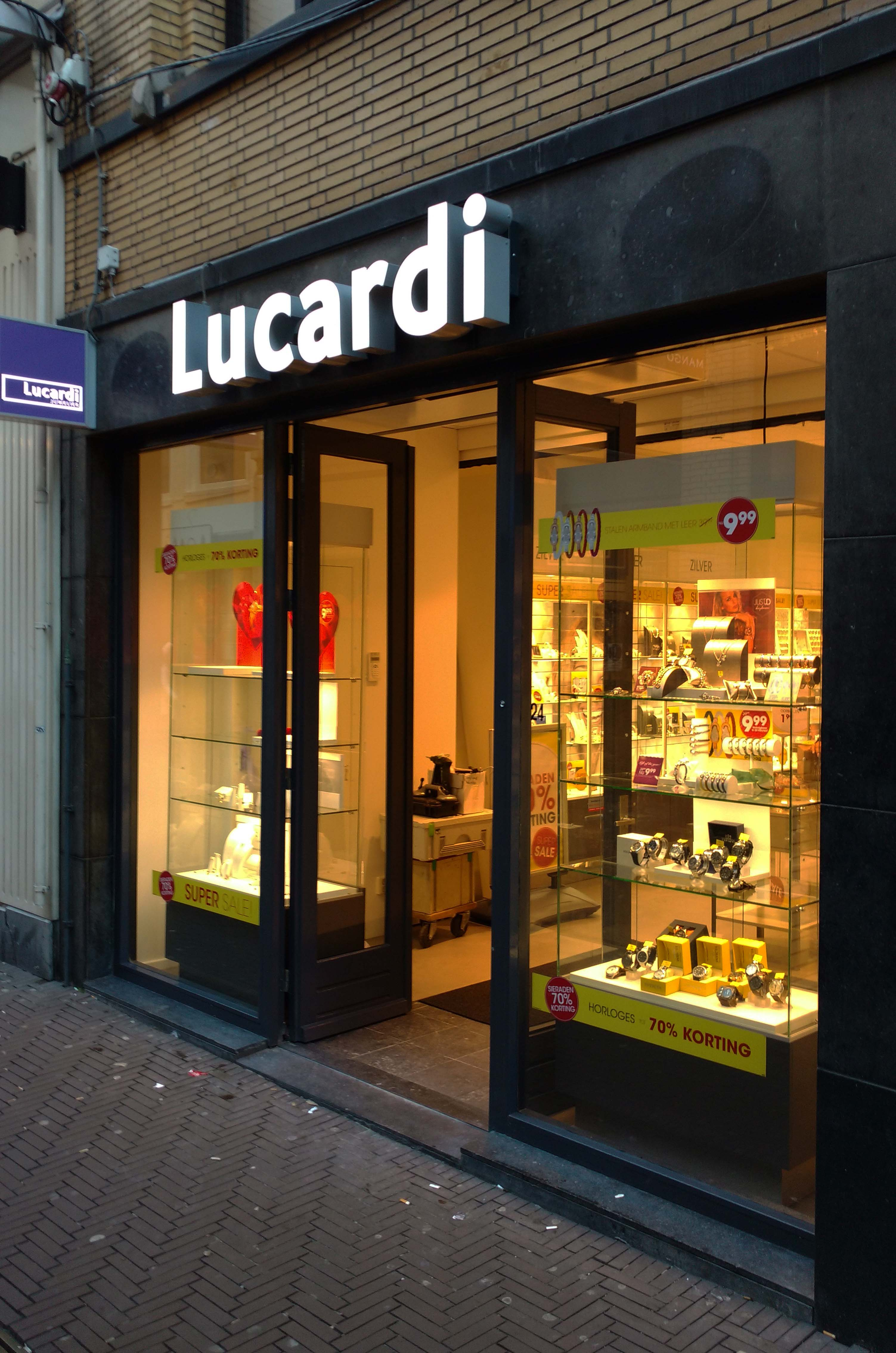 Het in 2016 geopende Lucardi filiaal in Den Haag